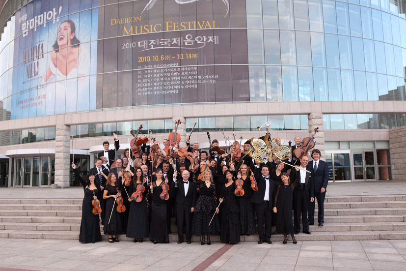 L'Orchestre Régional Avignon Provence